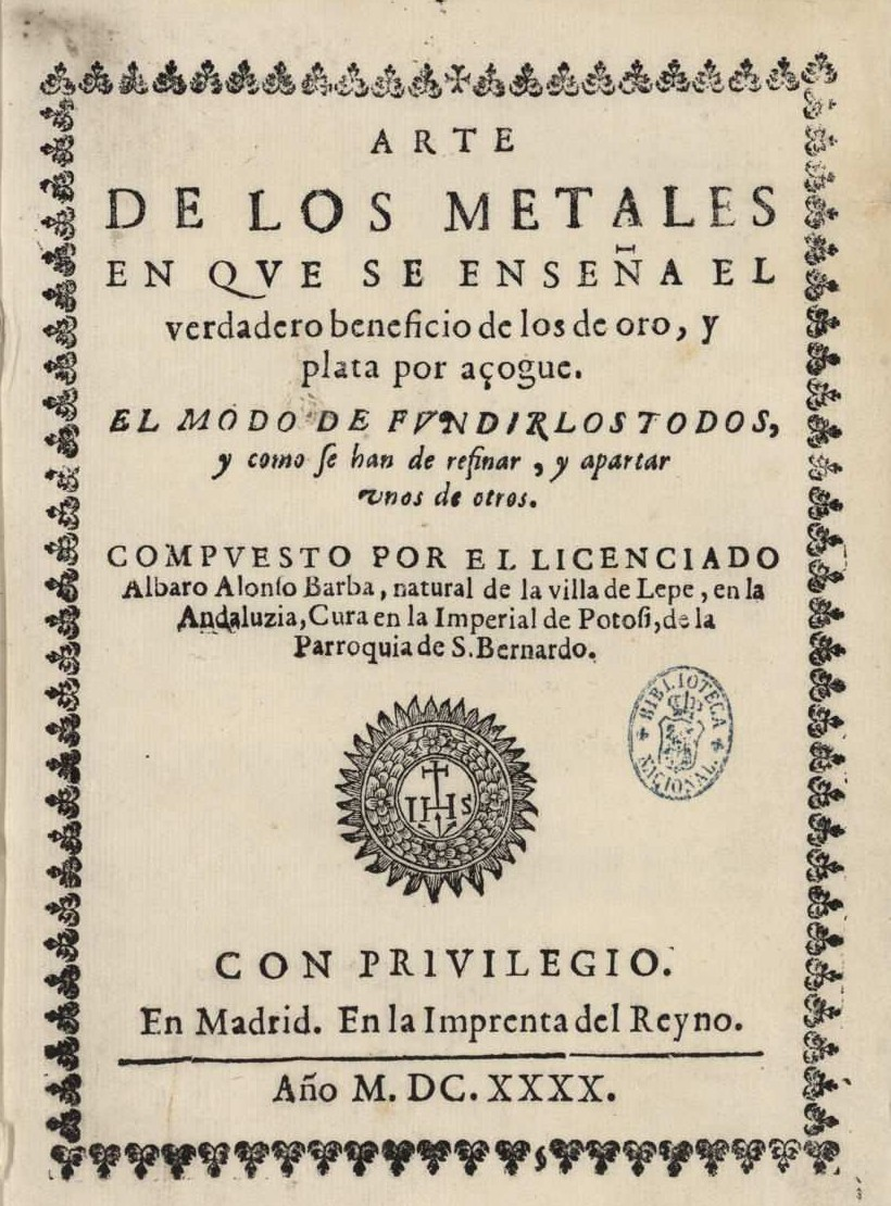 Portada del libro escrito por Alonso Barba